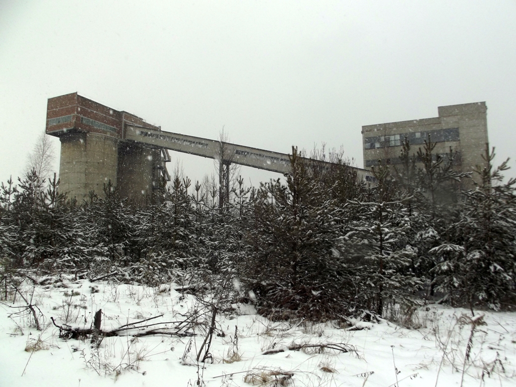 Zdjęcie zrobione podczas zimy sezonu 2013, w okolicach trzebińskiej Elektrownia Siersza.